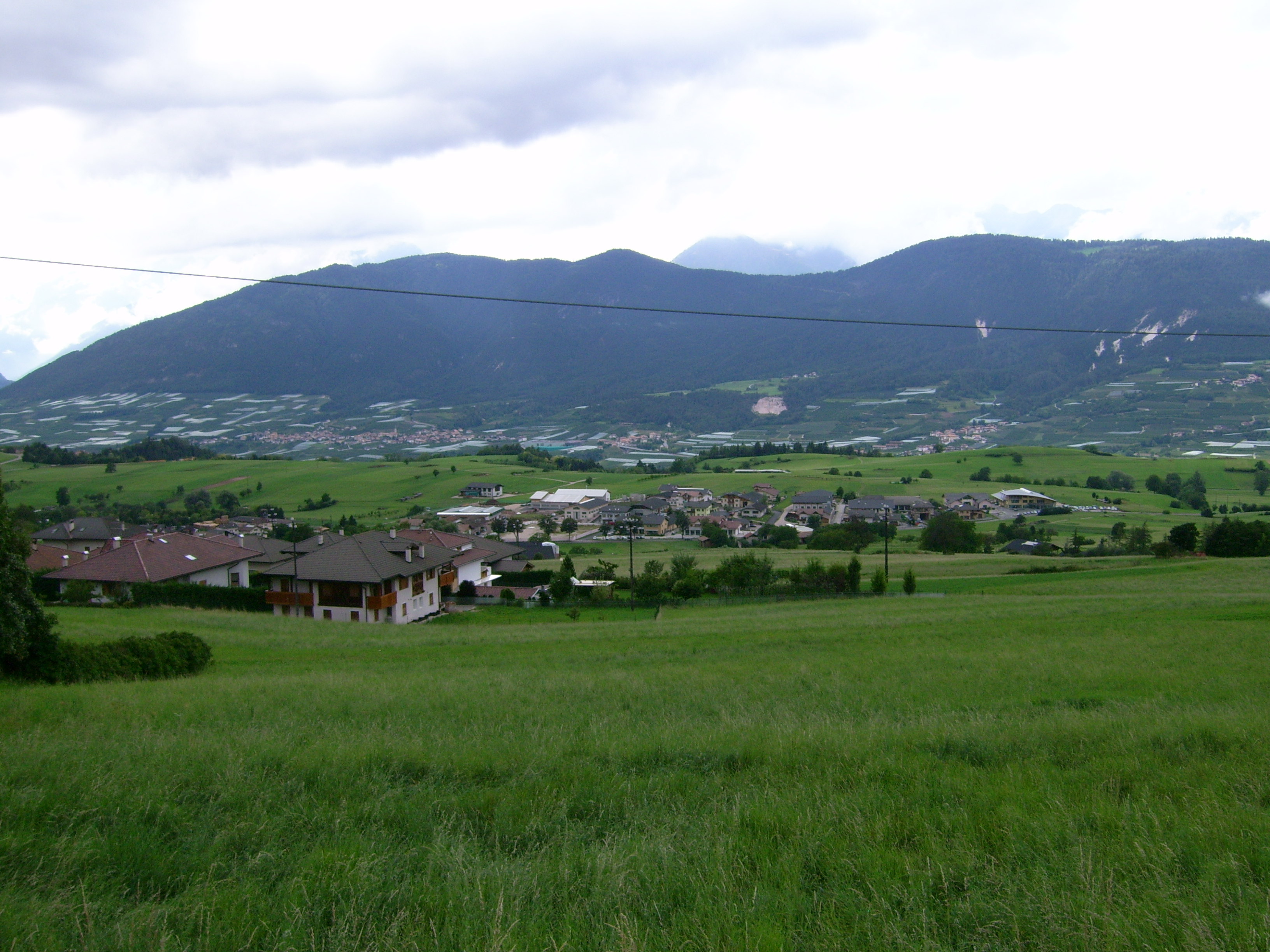 Ronzone (provincia di Trento), vista dalla statale.